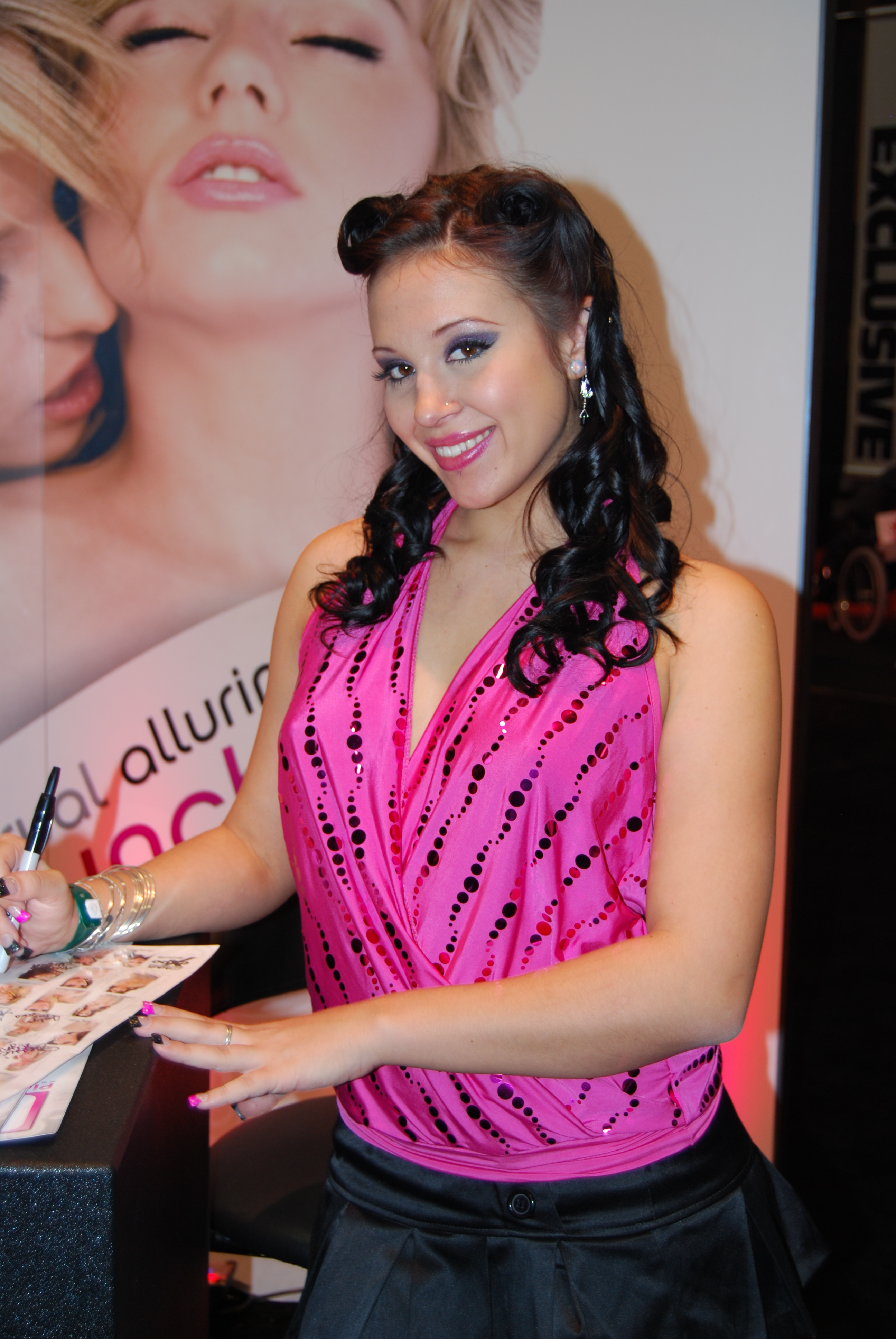 AEE2008_Nikon_Day2 098